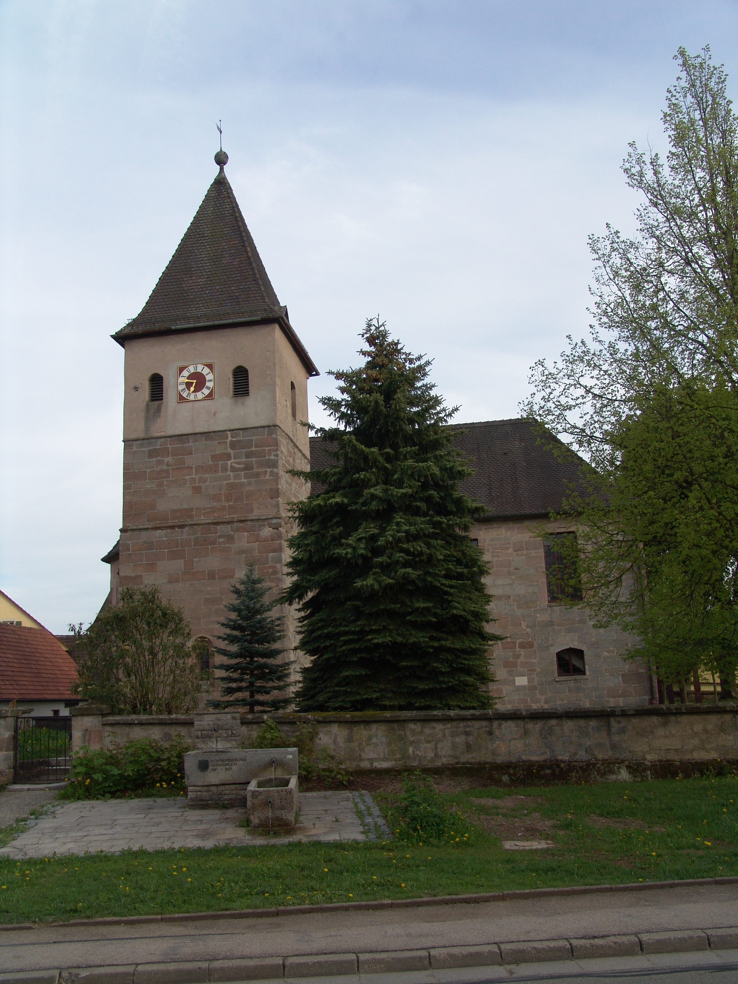 evang.-luth. Kirche St. Peter im Ammelbruch